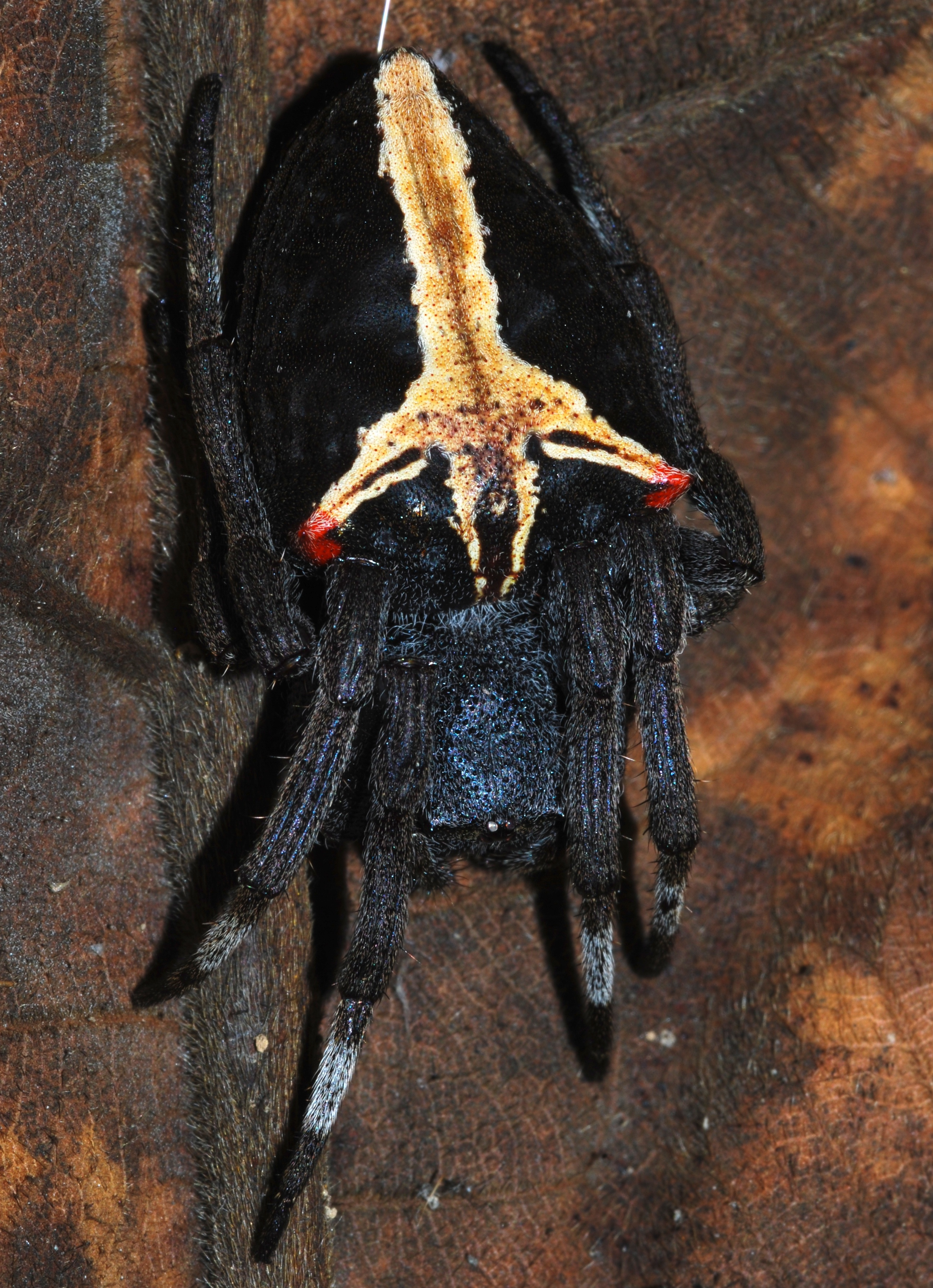 Taman Negara NP, Pahang, MALAYSIA